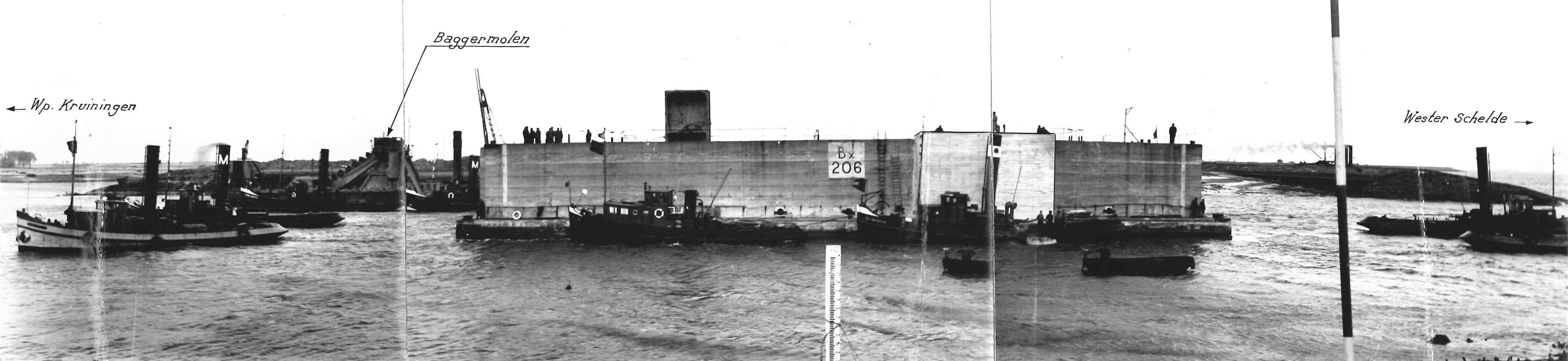 Panorama sluiting veerhagen bijKruiningen, met bijschriften op de foto